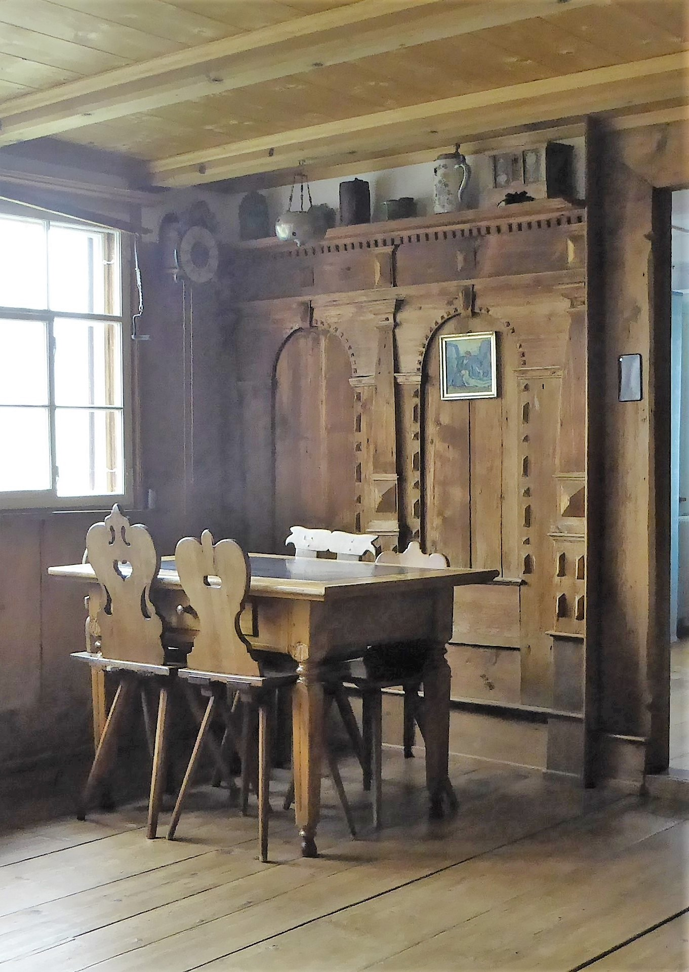 Getäferte Wand in der Stube des Ackerhauses Ebnat-Kappel